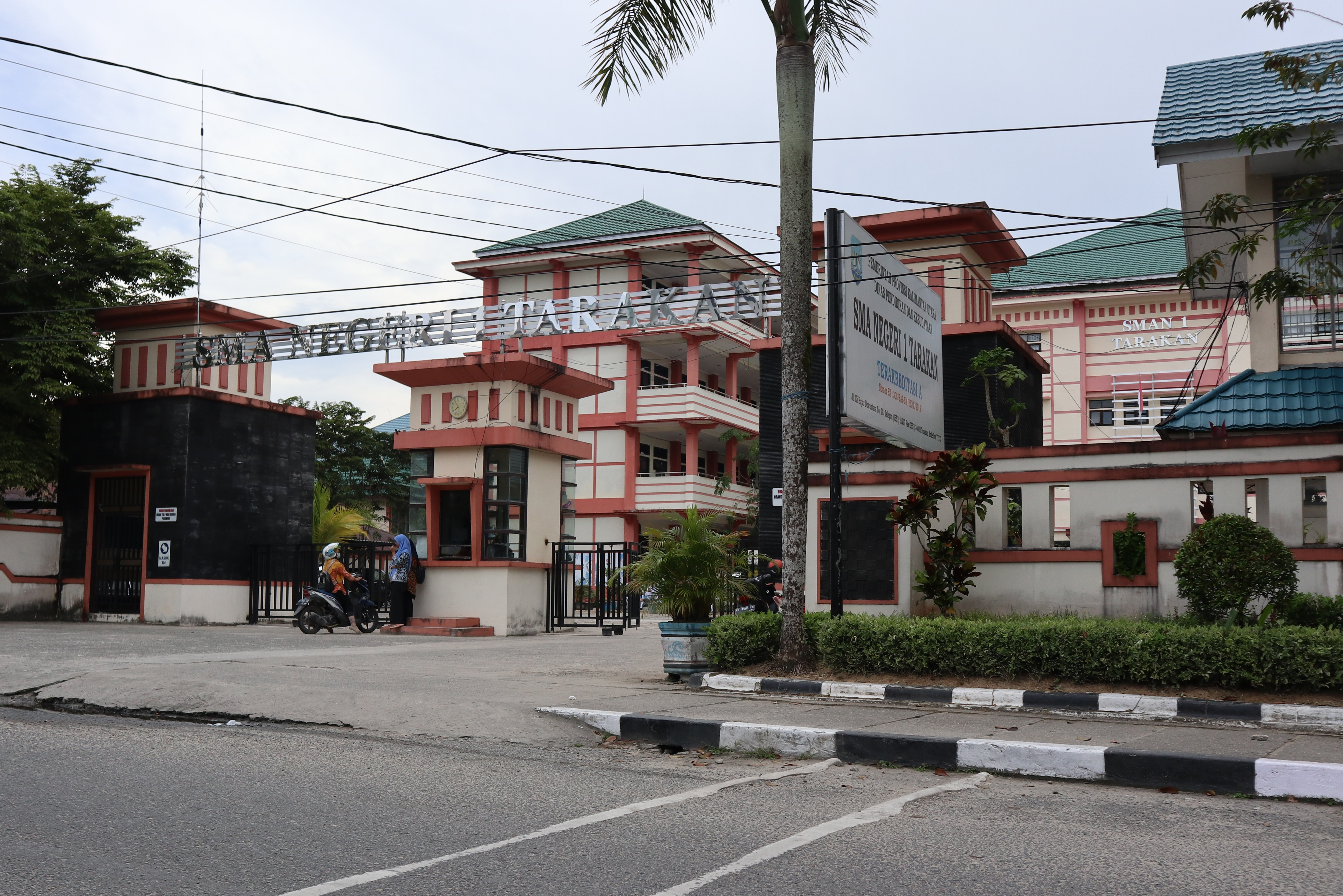 SMA Negeri 1 Tarakan, sekolah menengah atas yang pertama di kota Tarakan.